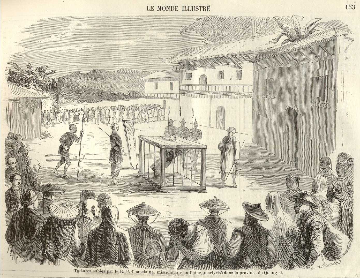 Tortures subies par le R. P. Chapedelaine, missionnaire en Chine, martyrisé dans la province de Quang-si